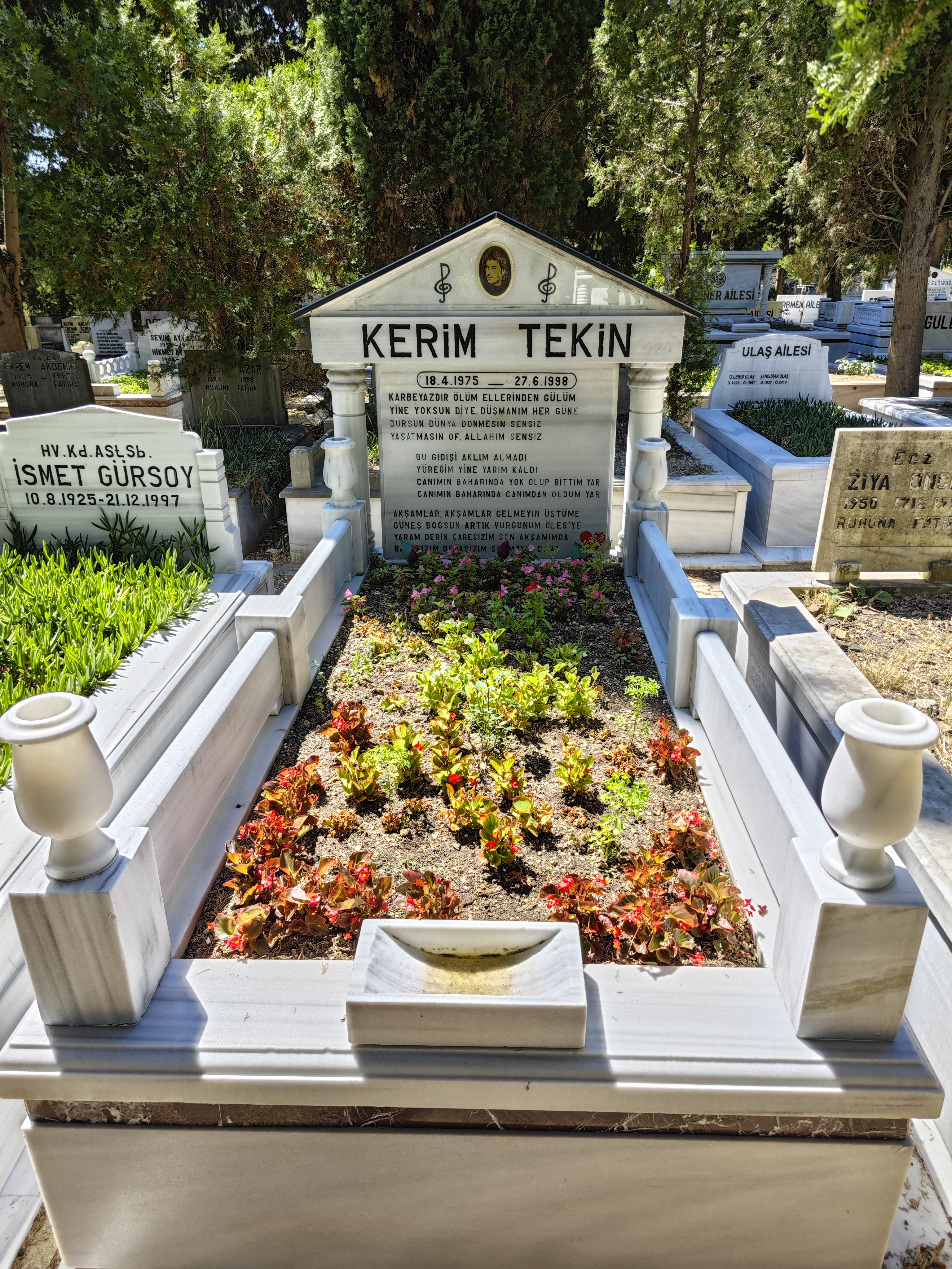 Kerim Tekin'in mezarı